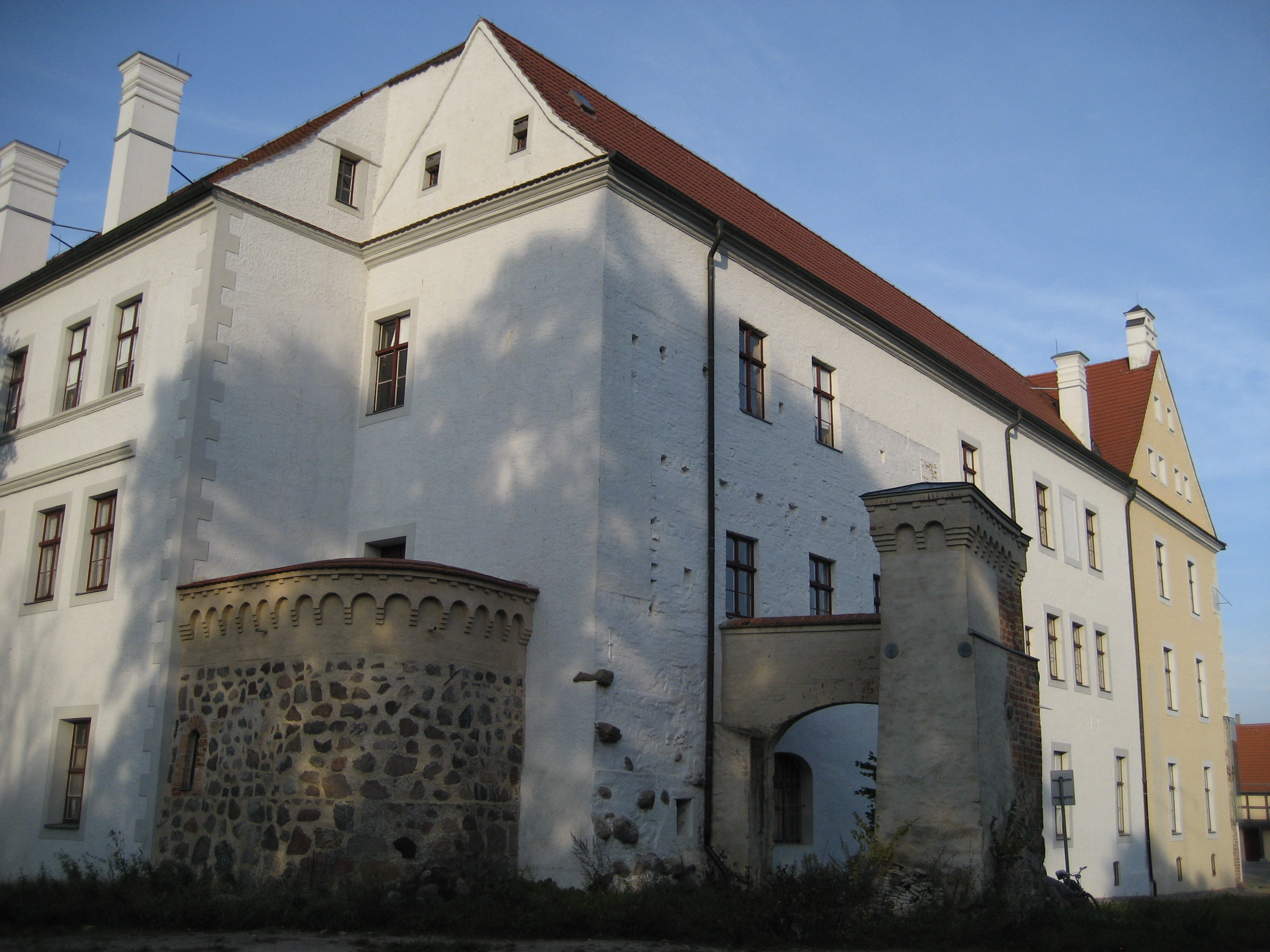 Das Schloss in Penkun (Südwest- und Südseite).